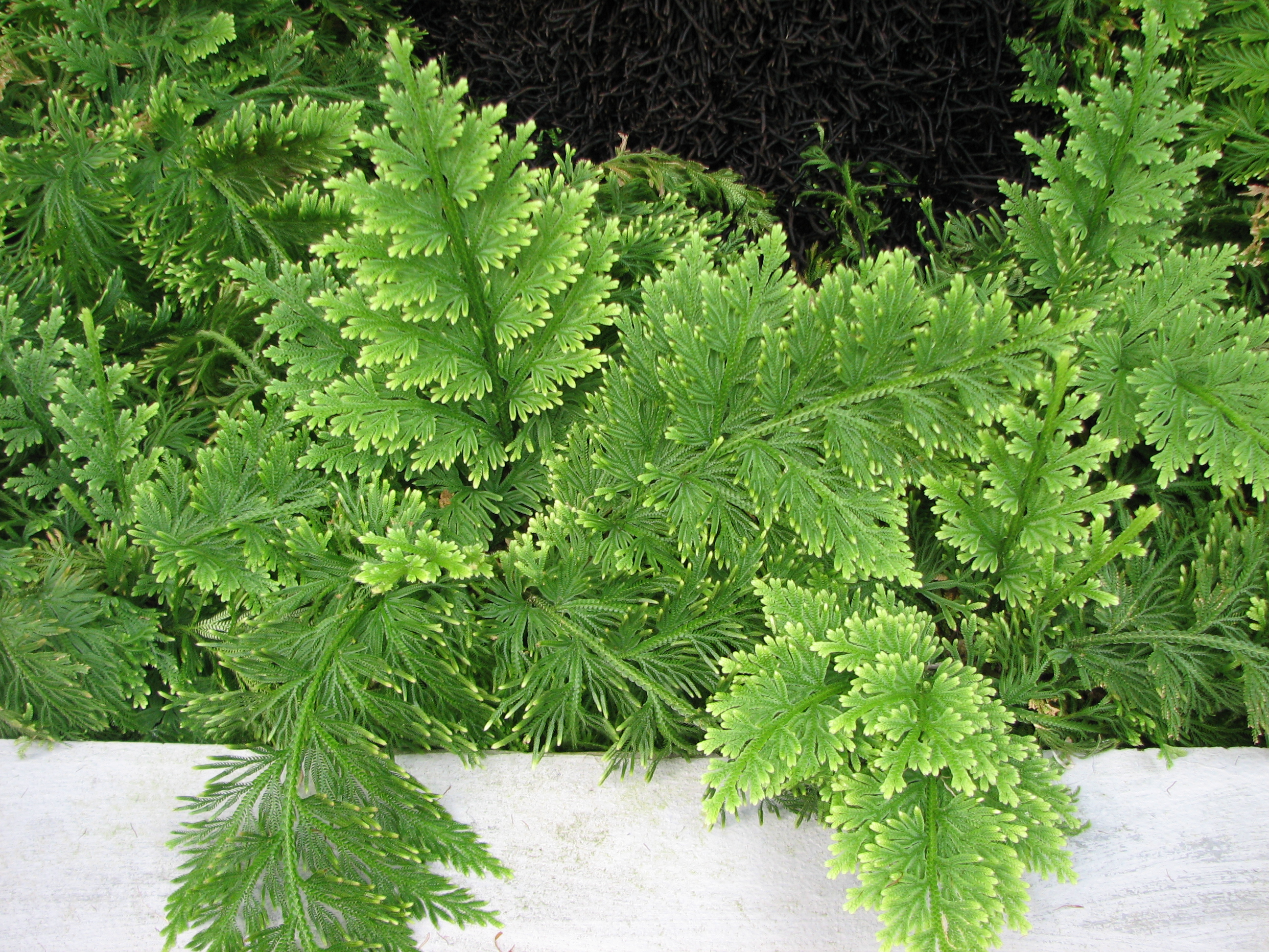 Selaginella pallescens (Botanická zahrada PřF MU)